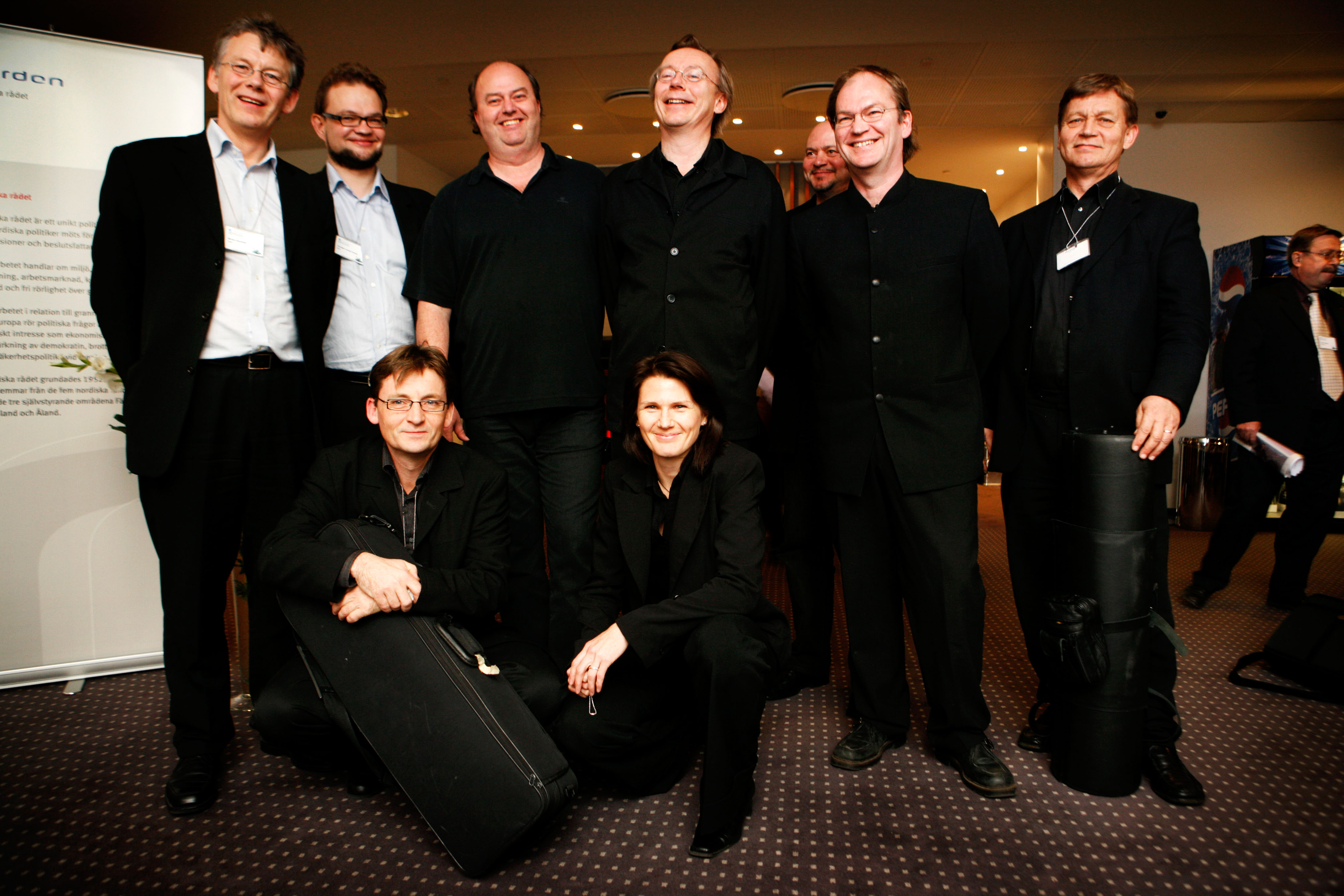 Cikada, vinnare av Nordiska rådets musikpris 2005.